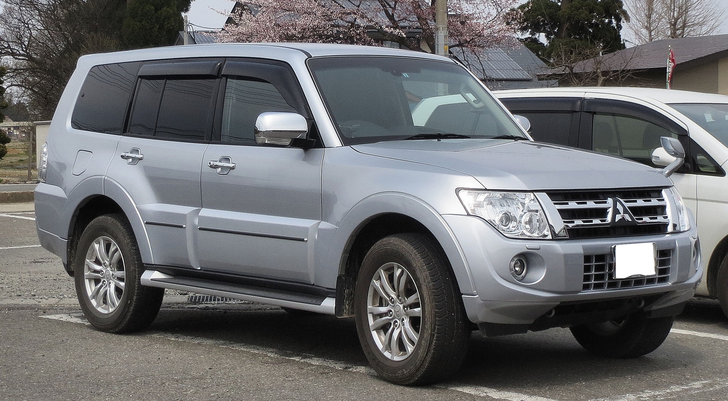 三菱 パジェロ ロングボディ Super Exceed 3200DID, 2011/10–2014